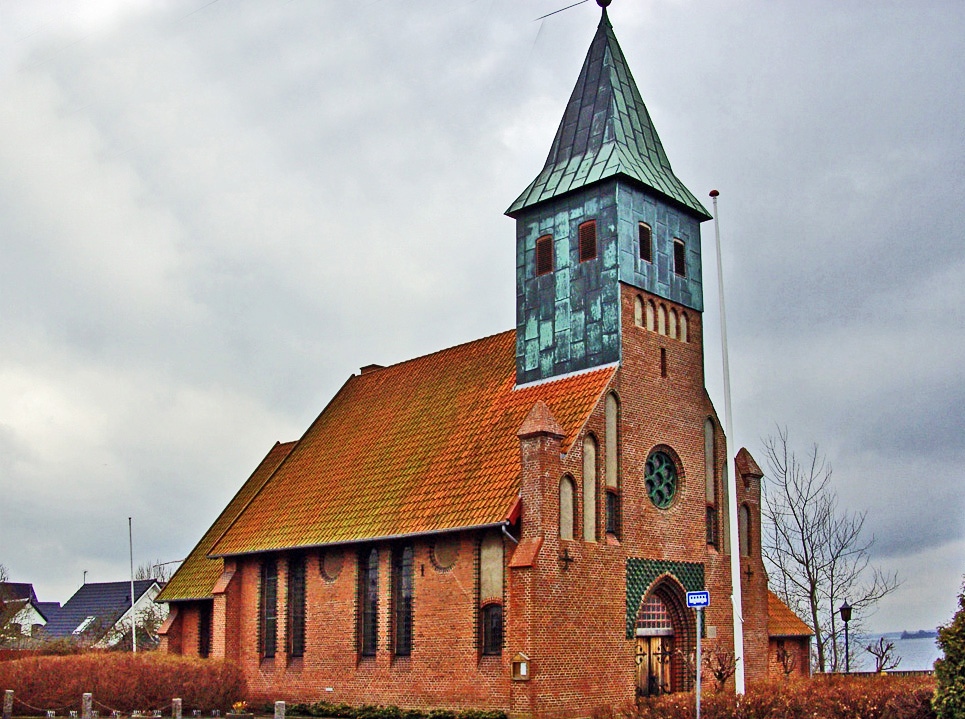 Egernsund Kirke fra nordvest, Sønderborg Kommune, Sønderjylland